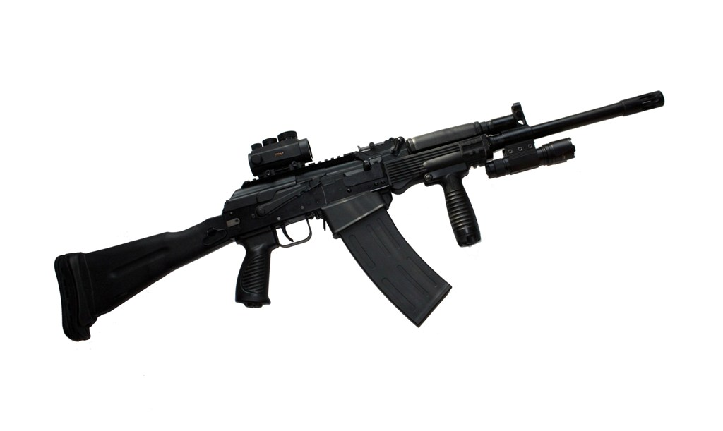 Фотография оружия.